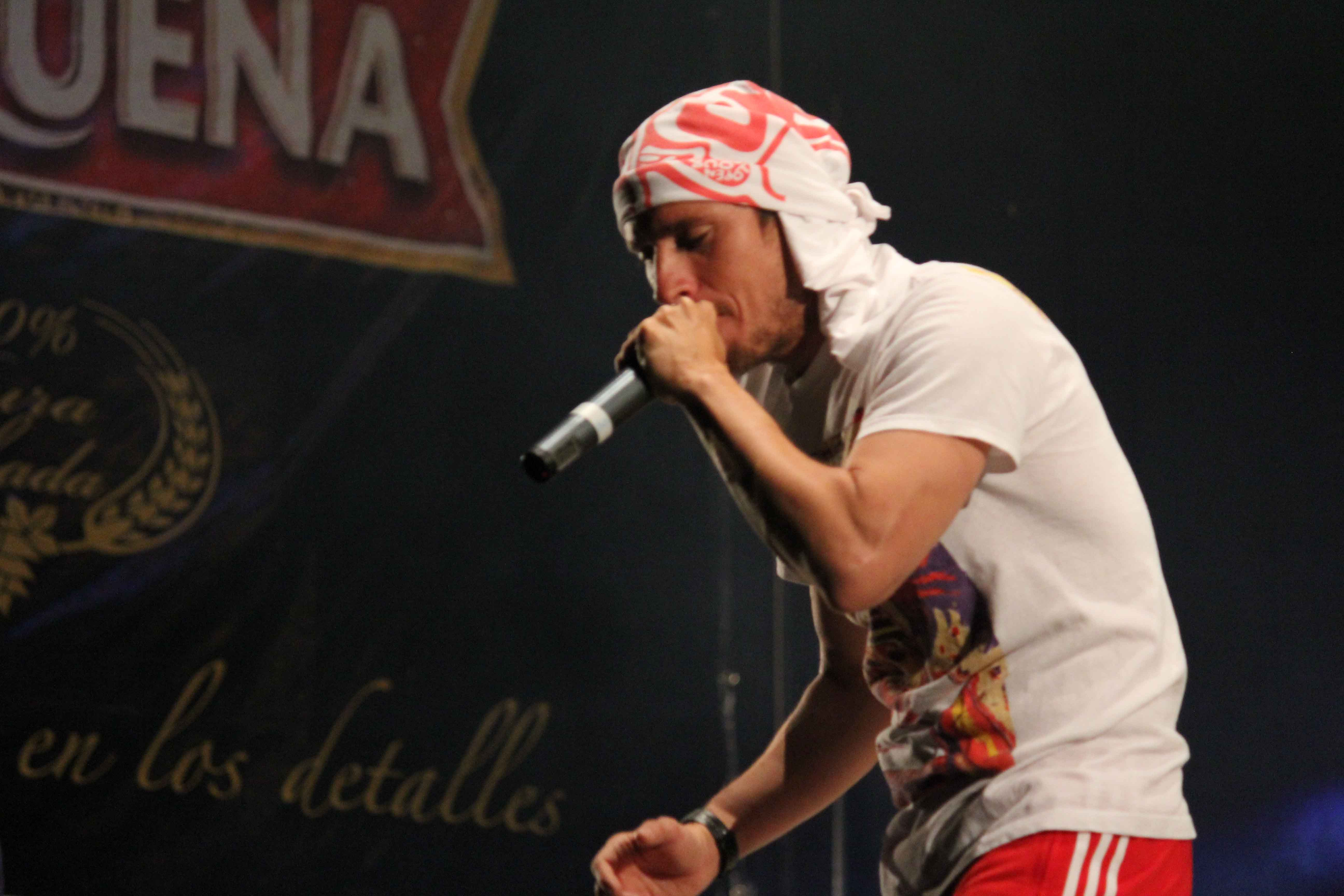 Viaje a Oxapampa Festival Selvámonos